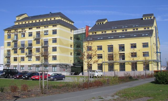 Denkfabrik in Magdeburg im Handelshafen, ehemal. Silo